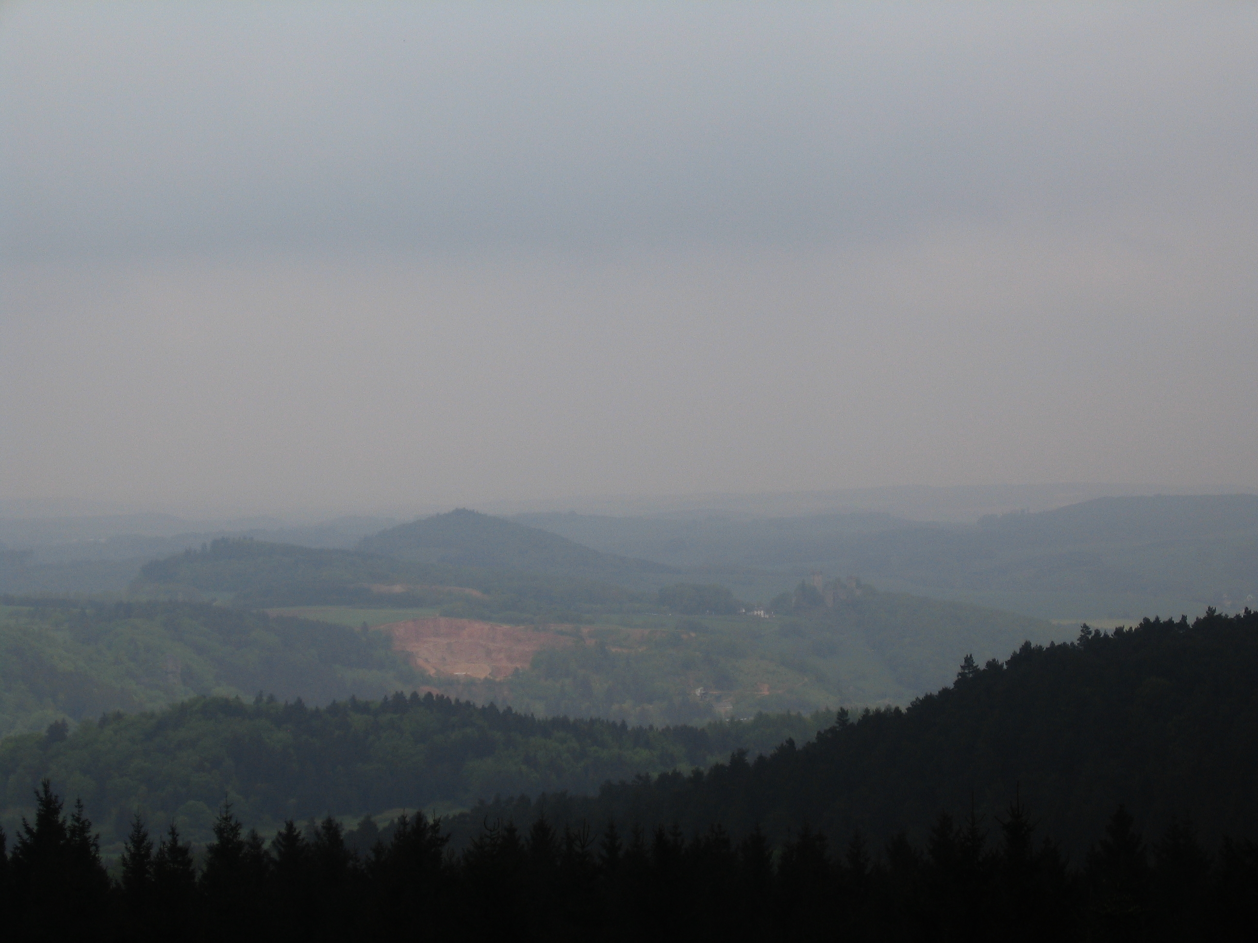 Rockeskyller Kopf (Mitte links) mit Kasselburg (über Pelm) rechts unten.